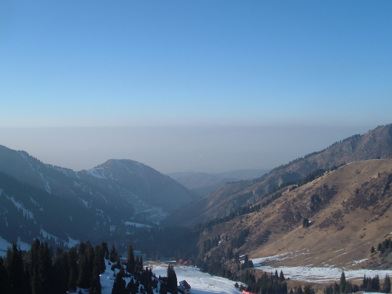 Mountains in Shymbulak, Kazakstan